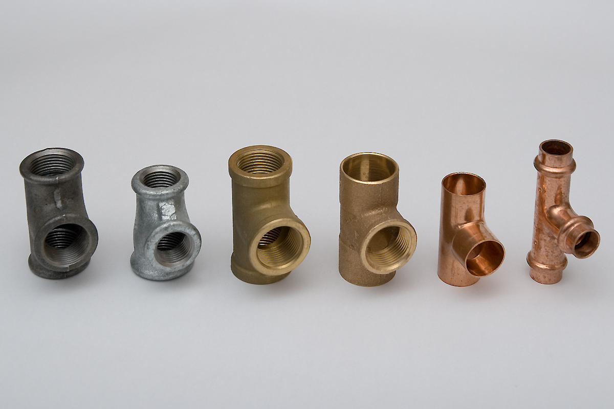 Verschiedene T-Stücke aus Temperguss (schwarz), verzinkt, Messing, Rotguss, Kupfer und Kupfer mit Pressanschlüssen (v.l.n.r.).